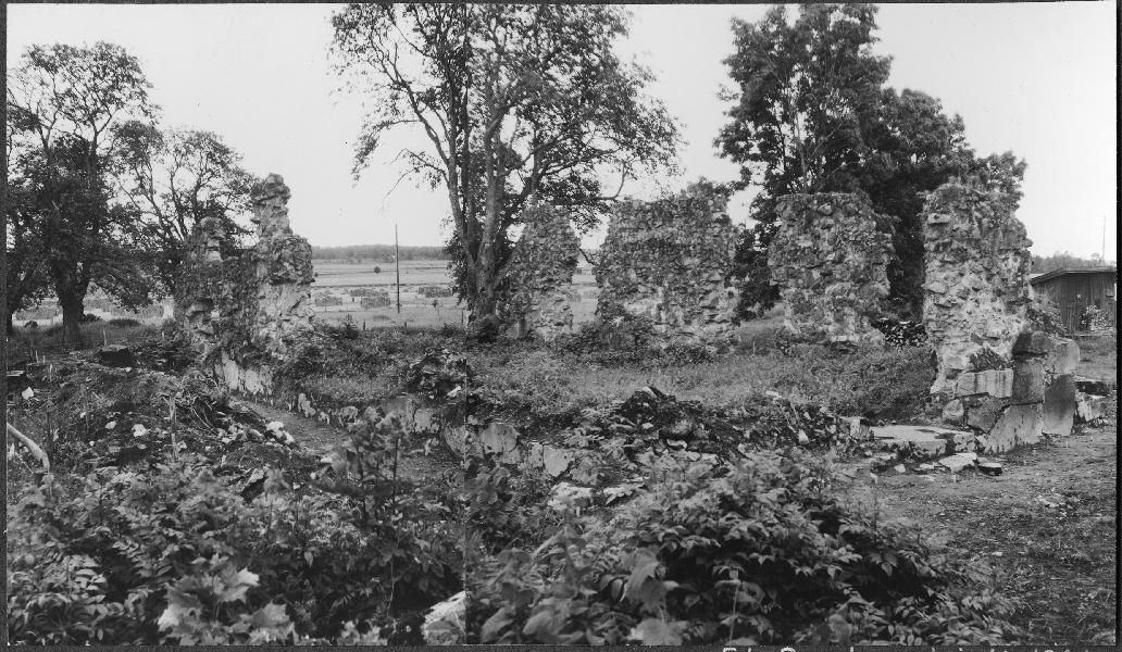 Kyrkoruinen från nordväst. Kategori: (01) ExteriörerKyrkoruinen från nordväst.